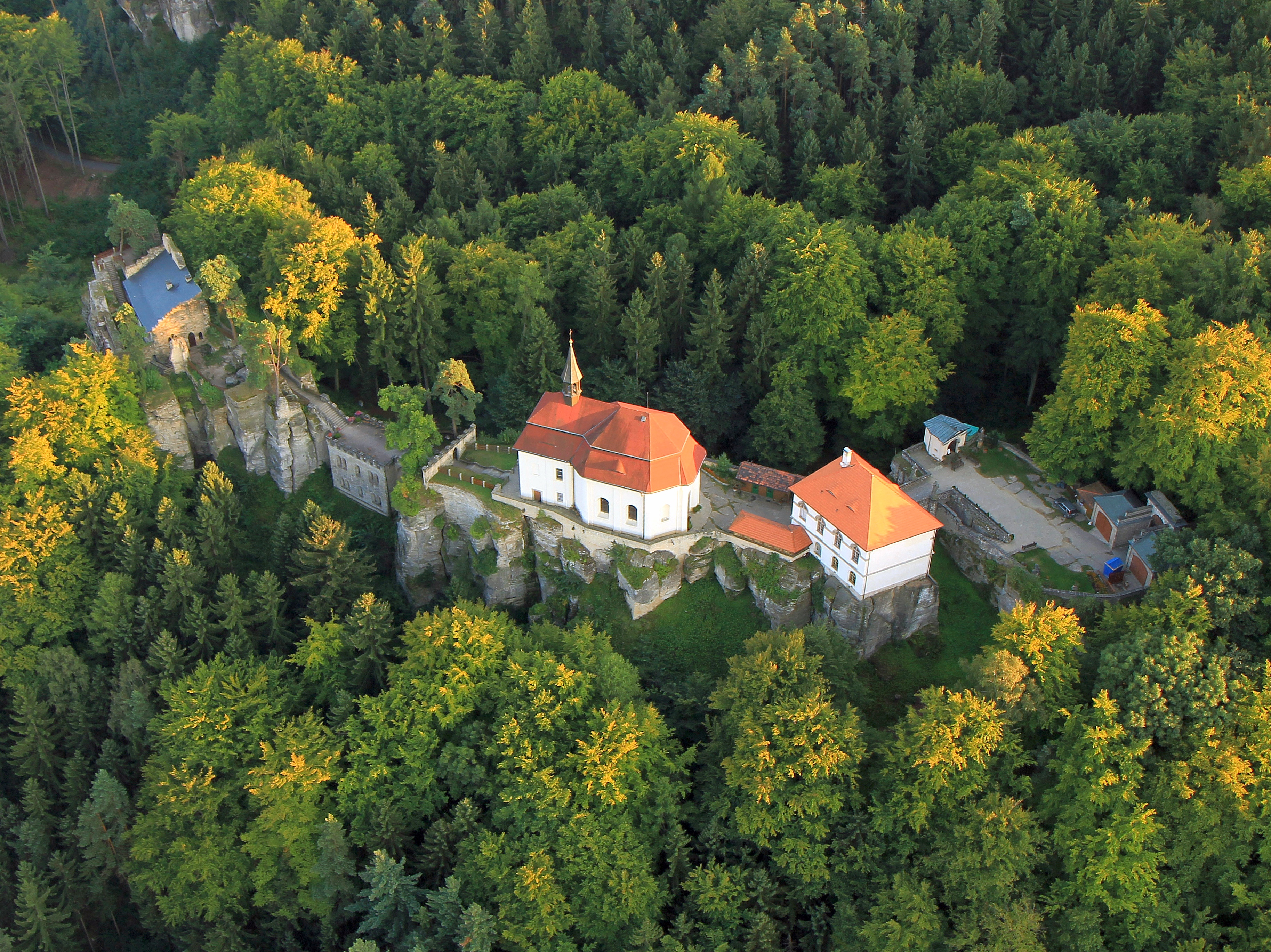 Hrad Valdštejn, zřícenina (Mašov), Mašov